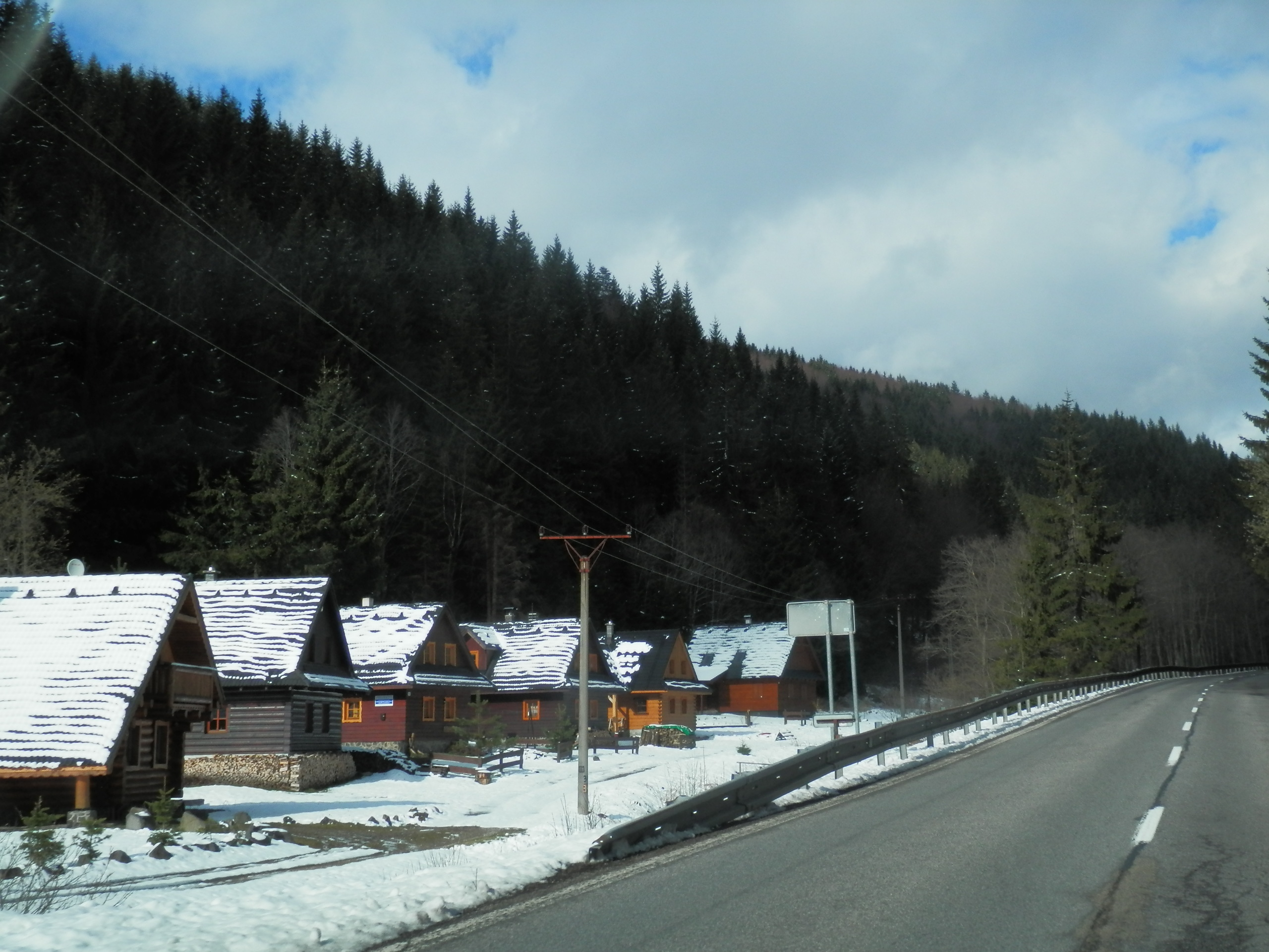 Utorok 18.4.2017 po veľkonočných sviatkov, zasnežená obec Jarabá, okres Brezno Slovensko.